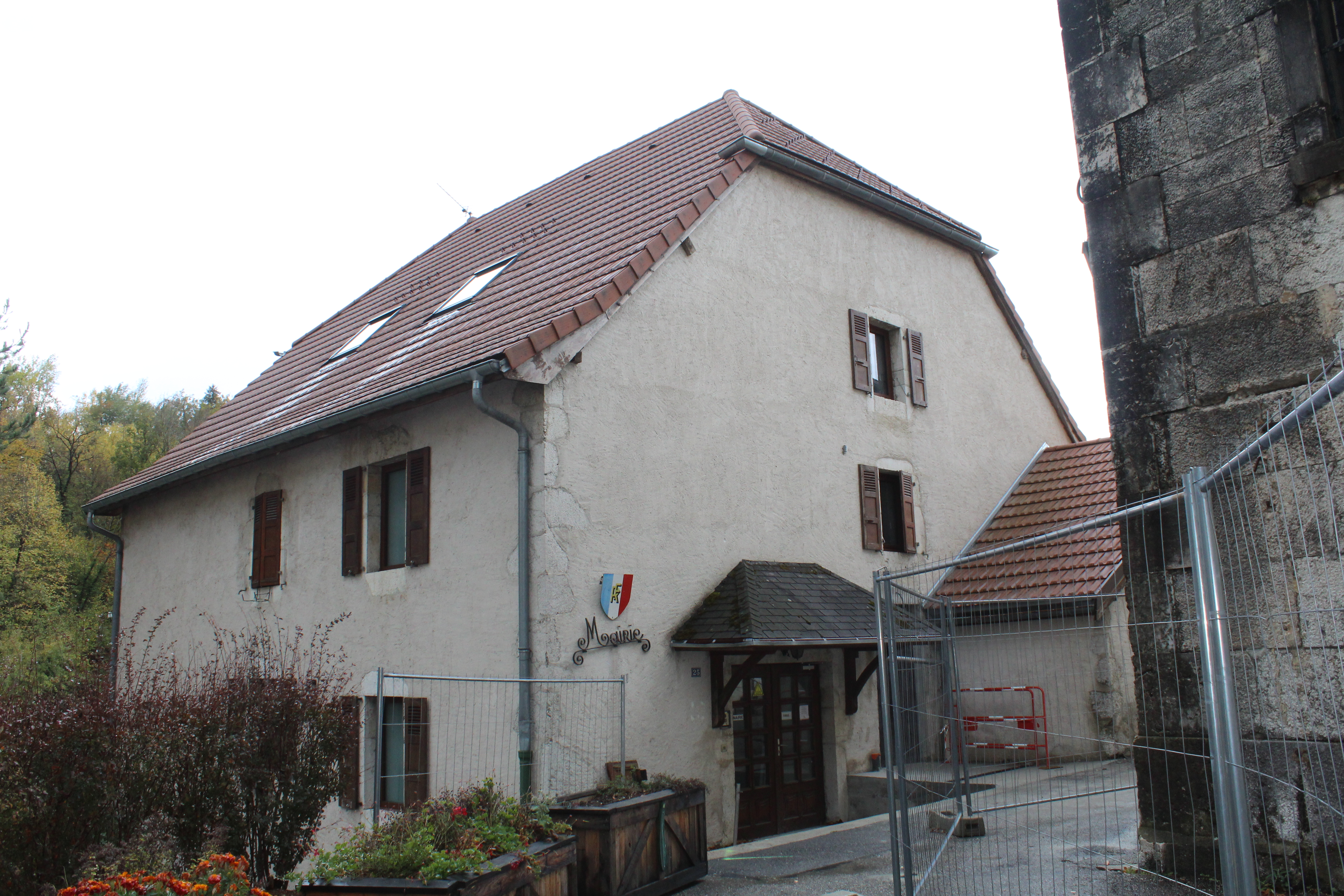 Mairie de Lancrans, Valserhône.